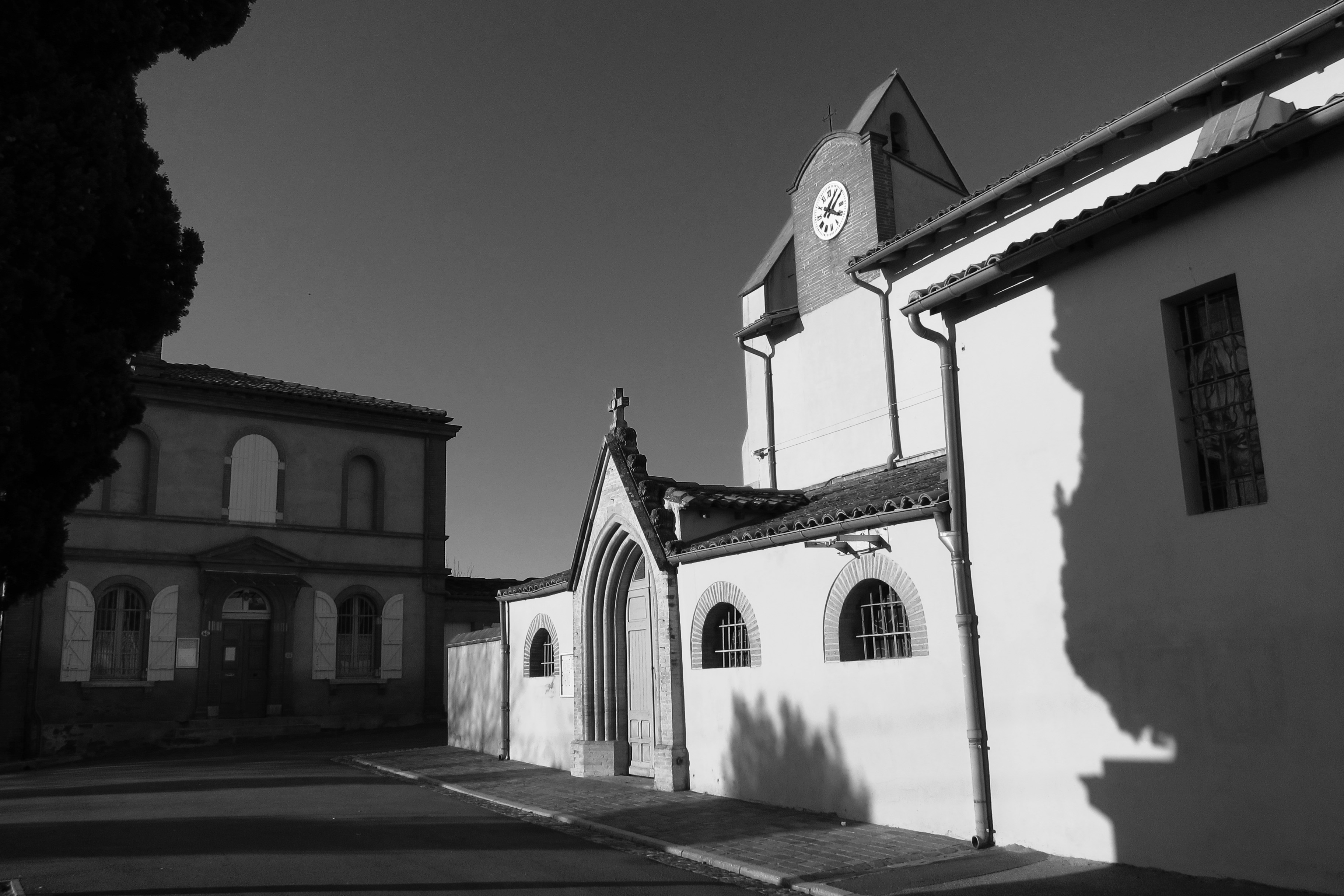 Toulouse (Haute-Garonne, Midi-Pyrénées, France) : L'église de Montaudran.